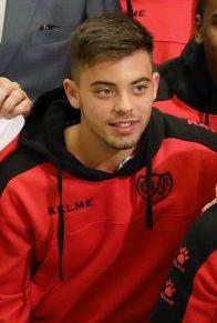 “¡Es fantástico, lo habéis conseguido! Habéis sido capaces de hacer esa gran gesta. Habéis dicho ¡a por ello! y lo habéis logrado”. Con estas palabras de felicitación la alcaldesa de Madrid, Manuela Carmena, ha comenzado su recepción, esta tarde, en el palacio de Cibeles, al equipo masculino de fútbol del Rayo Vallecano, recientemente ascendido a Primera División. “Habéis hecho algo muy grande y como alcaldesa de Madrid me siento muy feliz de que un equipo más de Madrid esté en Primera”, proclamó.